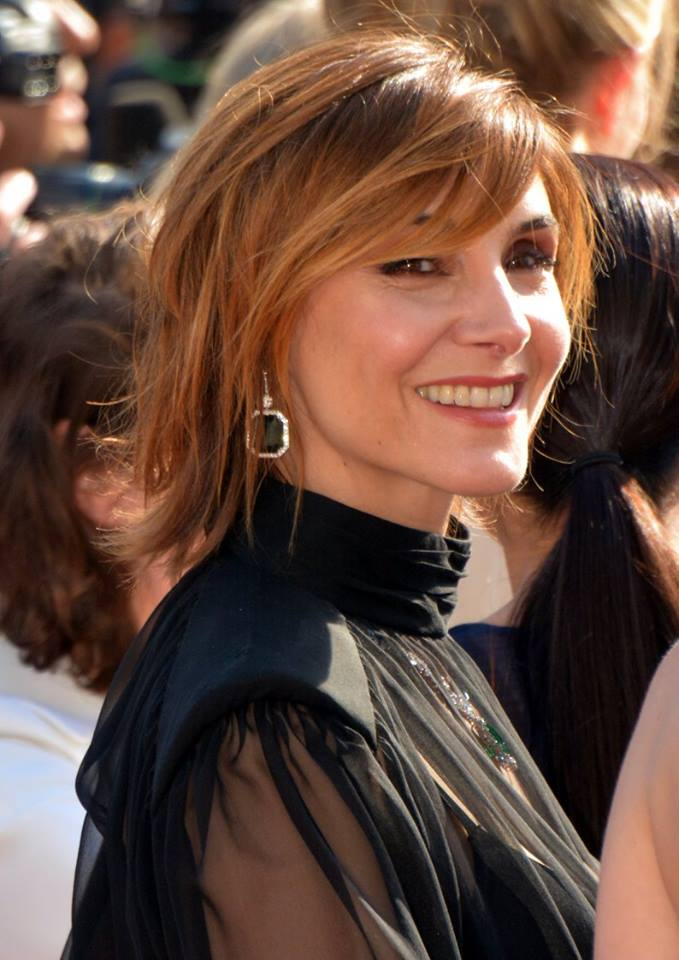 Clotilde Courau au festival de Cannes